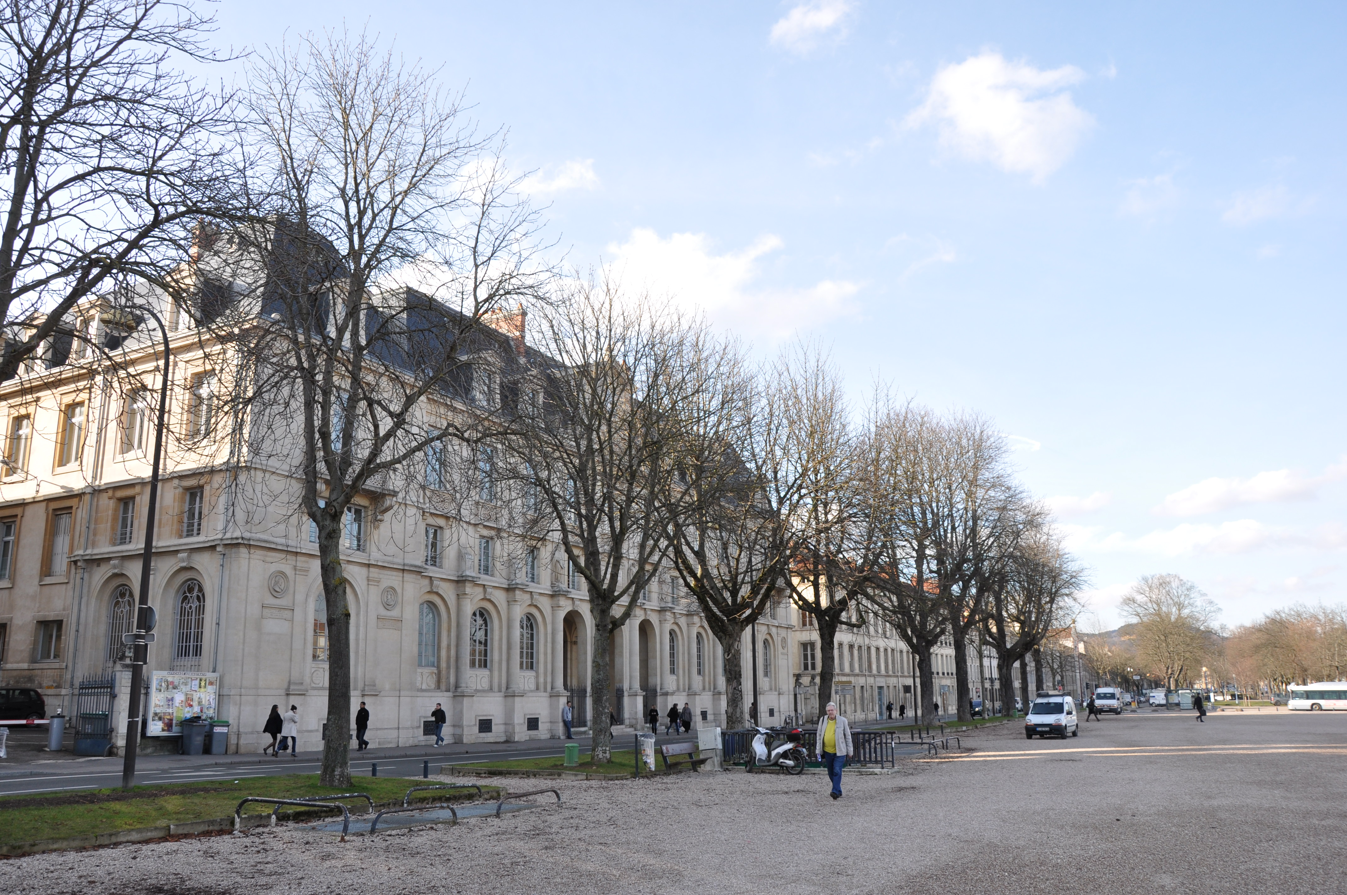 Place Carnot